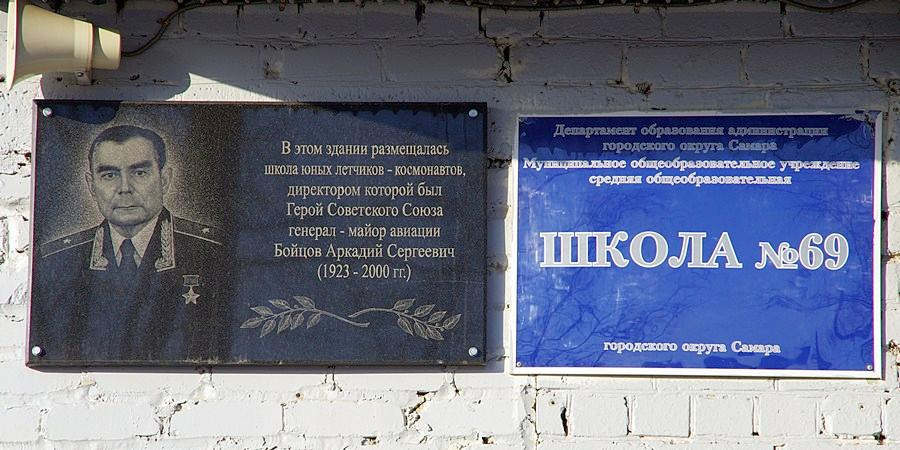 5 мая 2011 года в г. Самара на здании муниципальной школы № 69 была открыта мемориальная доска герою Советского Союза, генерал-майору авиации Аркадию Сергеевичу Бойцову. Ранее в этом доме находилась Куйбышевская школа летчиков и космонавтов, директором которой являлся Бойцов